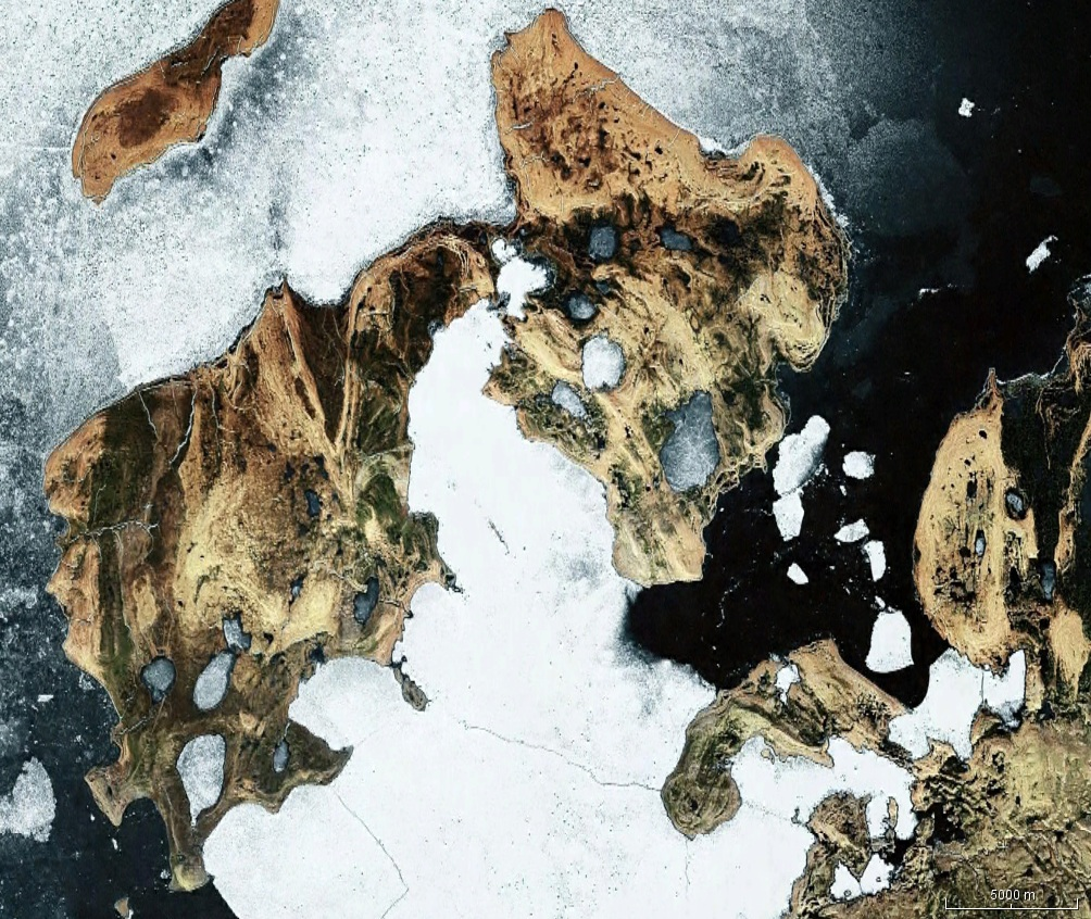 Petite île Cornwallis, Nunavut